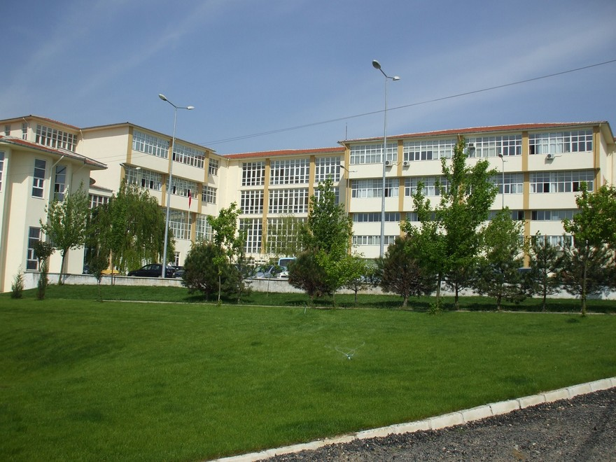 Çorlu Mühendislik Fakültesi önden görünüm.Resmi sitesinden alıntıdır.